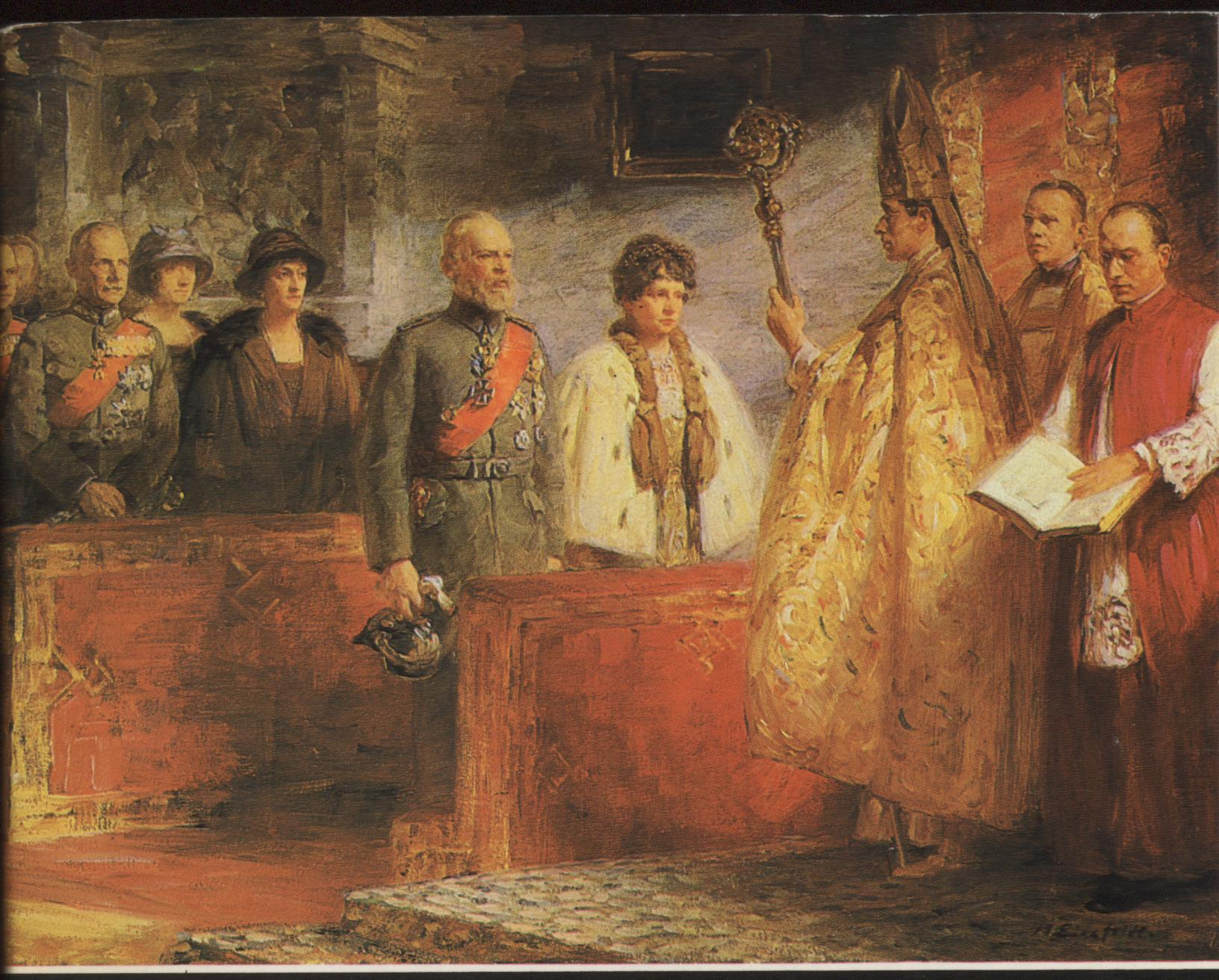 Goldene Hochzeit Prinz Leopold von Bayern, 1923. Ganz links außen, hinten, Kronprinz Rupprecht. Der Bischof ist Nuntius Eugenio Pacelli (Pius XII.) und rechts neben ihm Prinz Georg von Bayern als Priester.